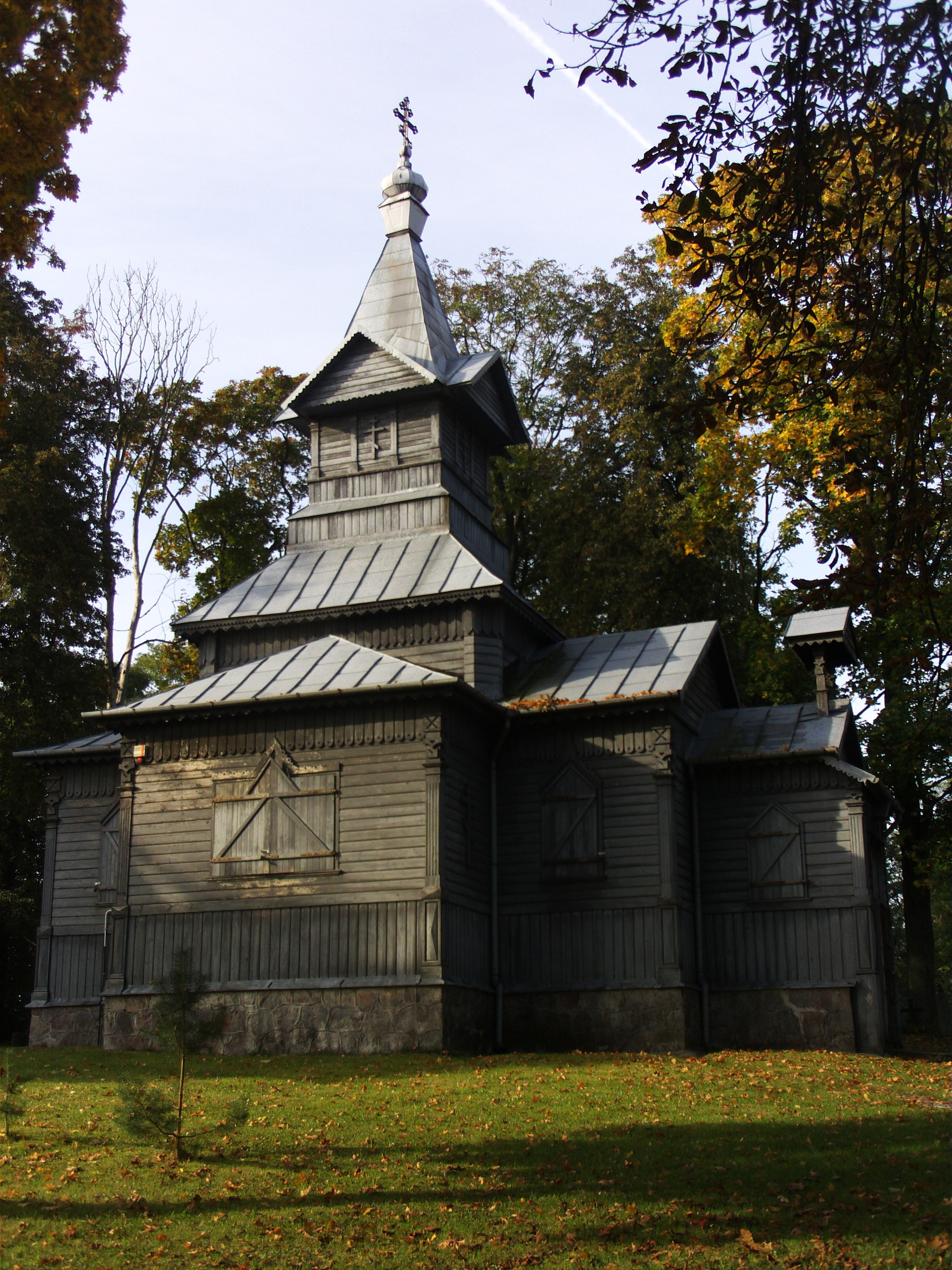 Cerkiew Wszystkich Świętych w Suwałkach